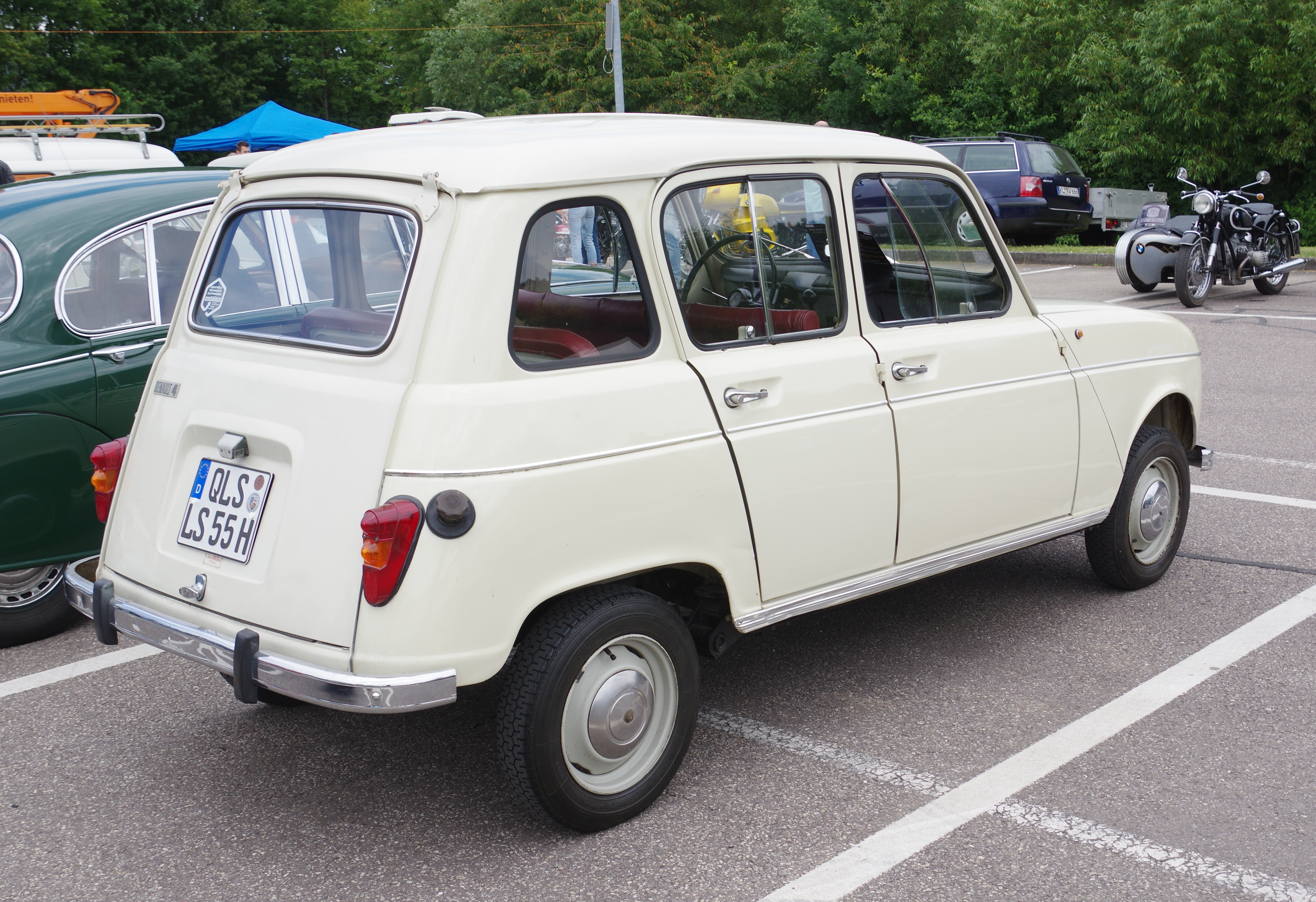 Renault 4, 1966, 34 PS, 32. Internationales Oldtimer Treffen Konz 2016, Das Nummernschild ist verfälscht!